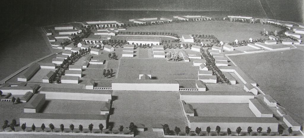 Bild Luft- und Heeresnachrichtenschule Halle Modell ca 1935